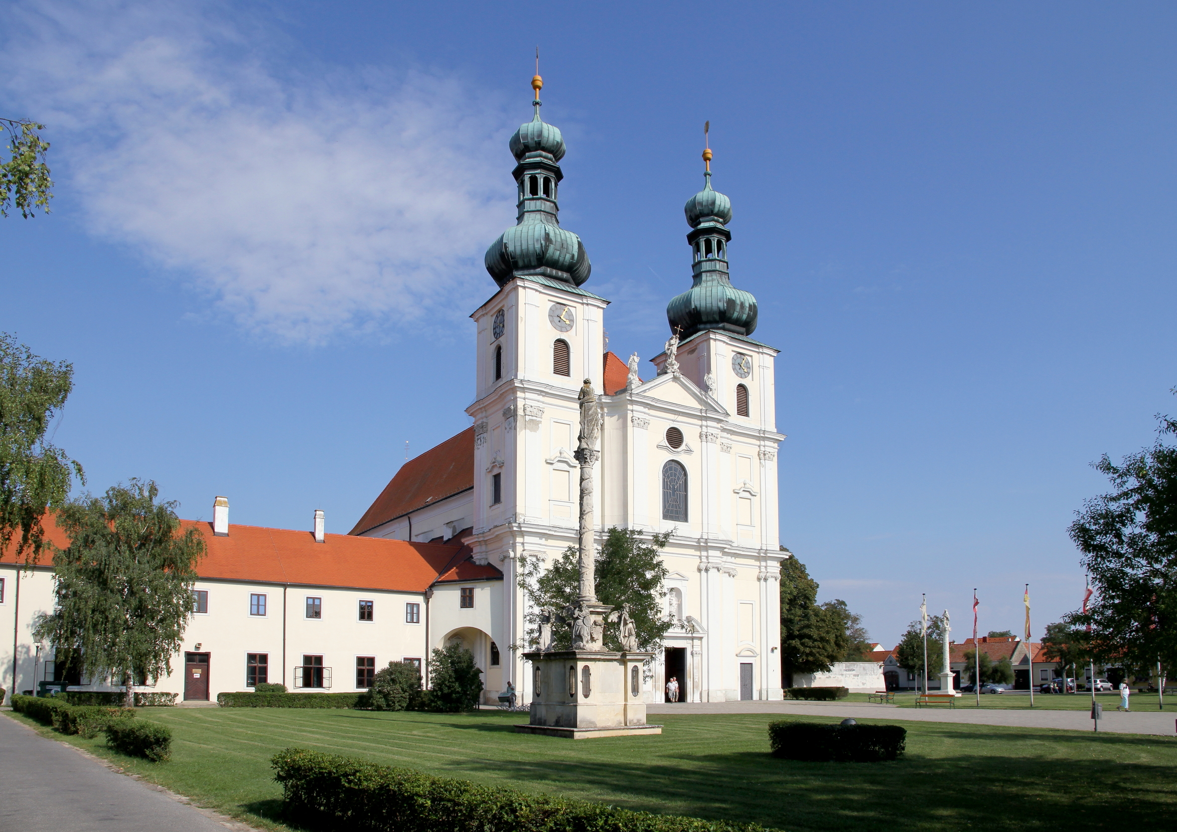 Die Basilika Mariä Geburt in der burgenländischen Stadt Frauenkirchen. Im Vordergrund die Mariensäule und links ein Gebäude des Franziskanerklosters.